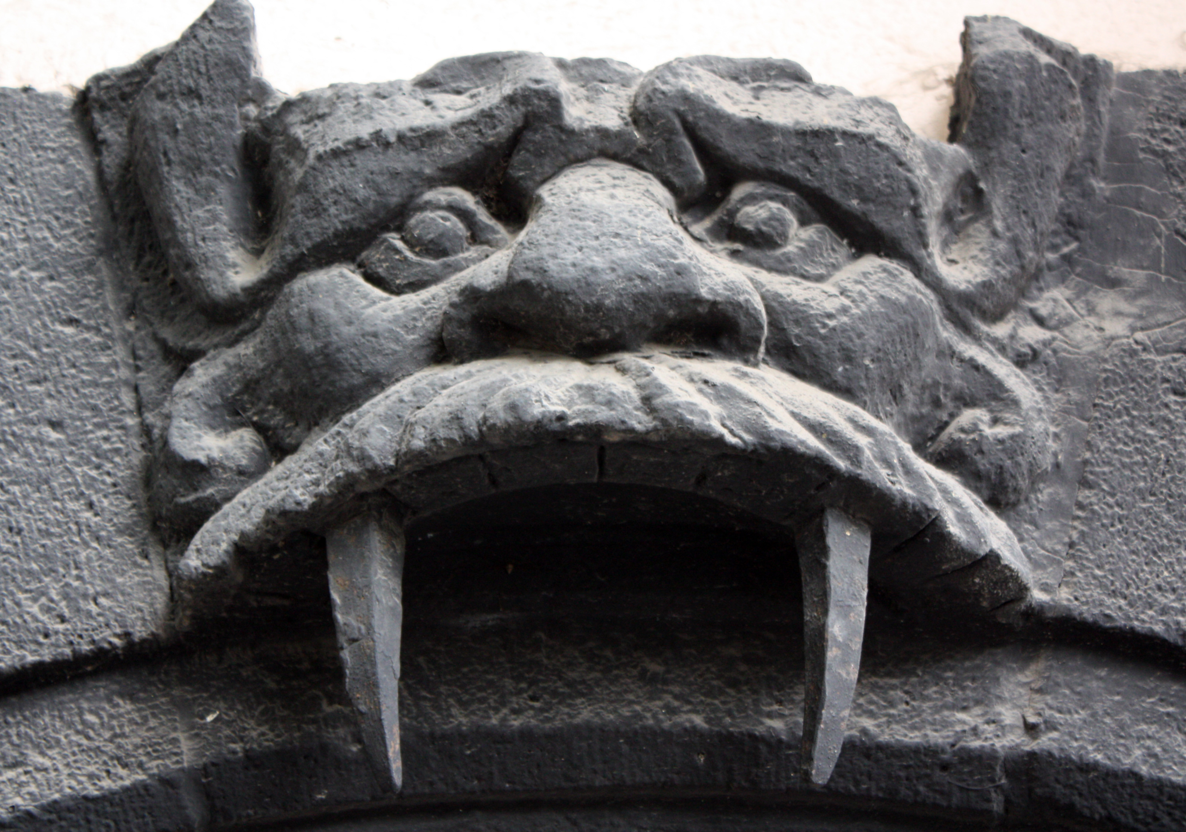 Köln, Altstadt. Grinkopf in der Markmannsgasse